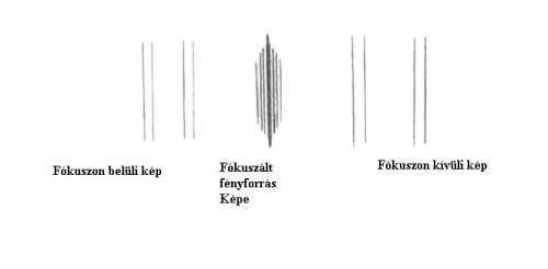 Fehér fekvő téglalapon három fókuszkép rajza.